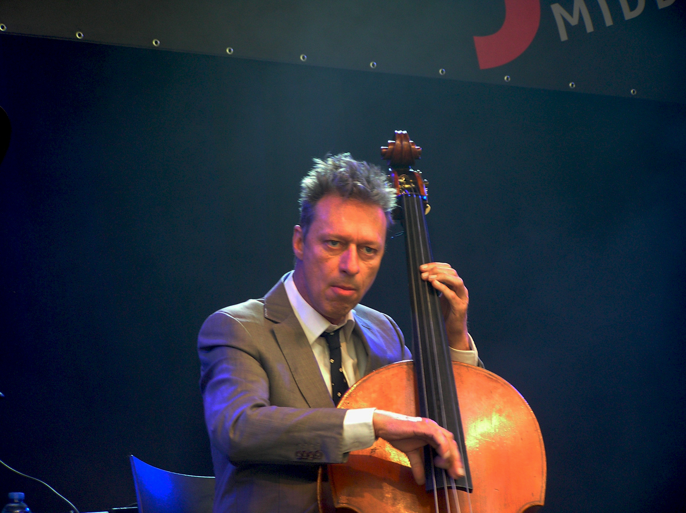 Ernst Glerum tijdens het International Jazz Festival Middelburg in een optreden met Benjamin Herman.